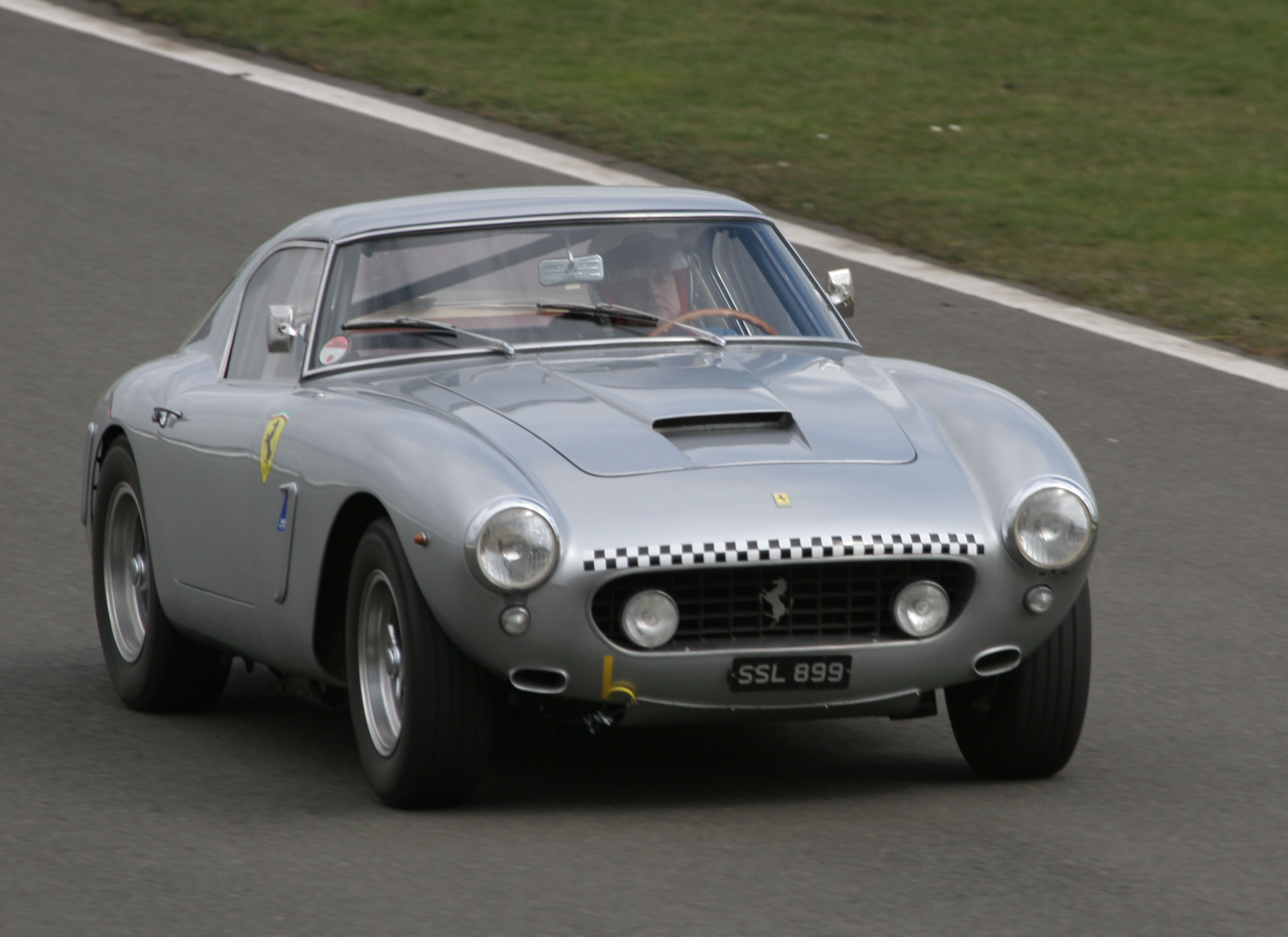 Ferrari 250 GT Berlinetta